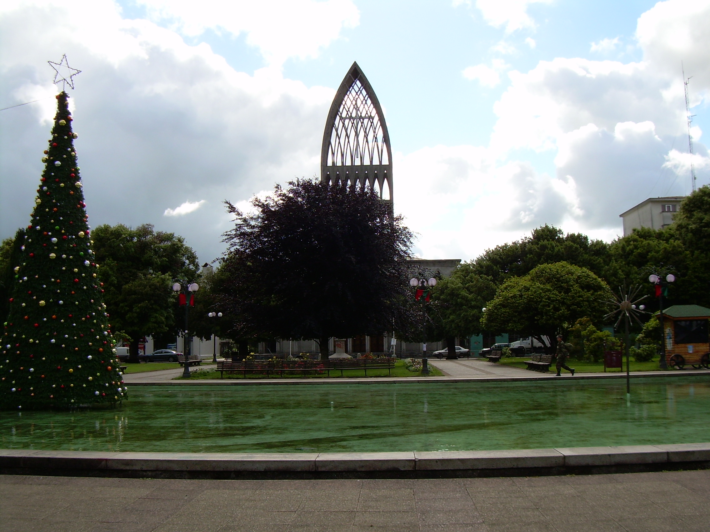 Plaza de Armas Osorno (Chile).jpg